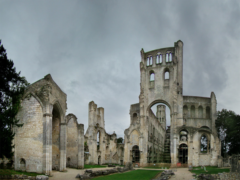 Abbaye de Jumièges, Seine-Maritime, Normandie, France.